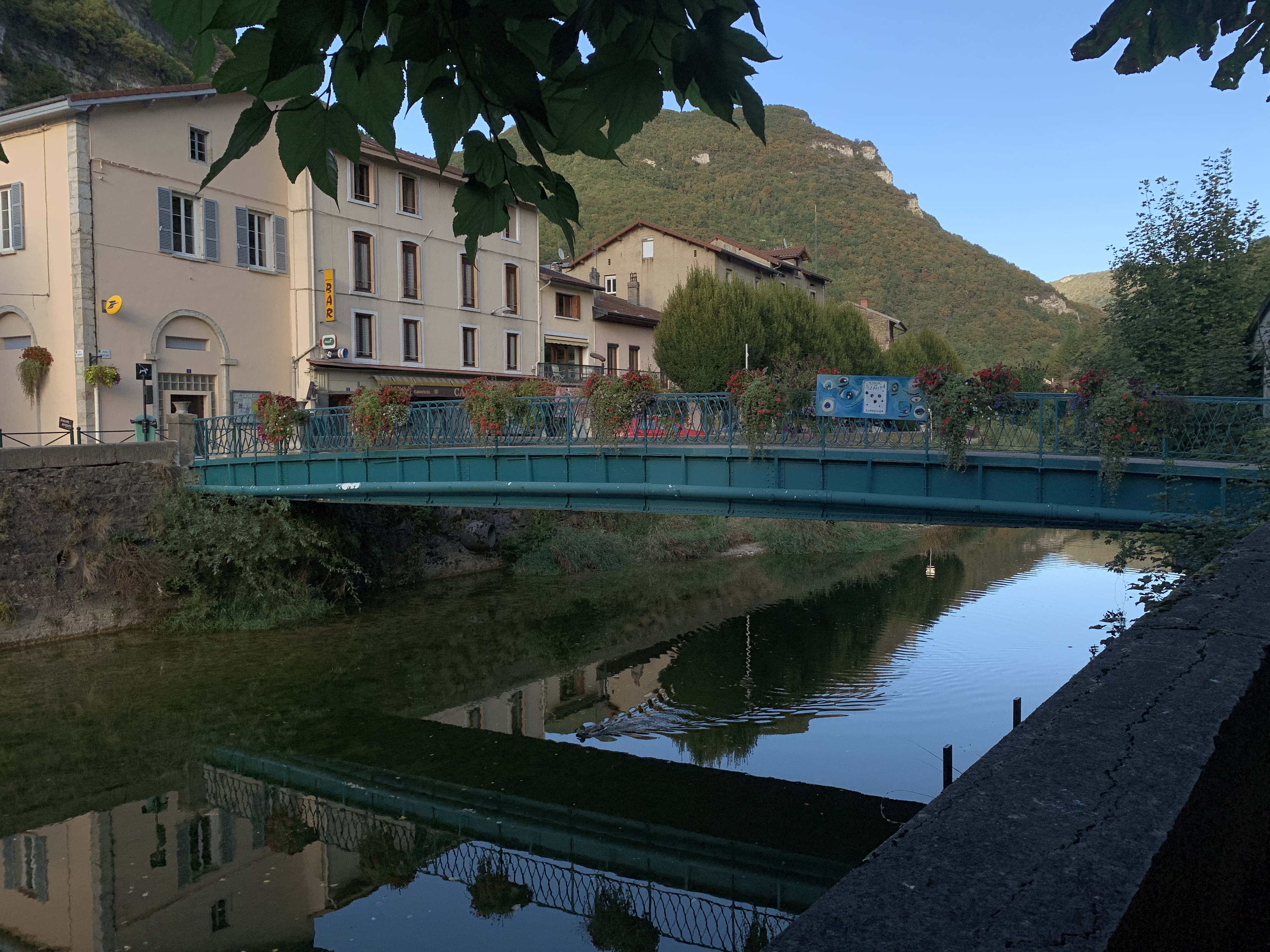 L'Albarine à Saint-Rambert-en-Bugey (septembre 2019).